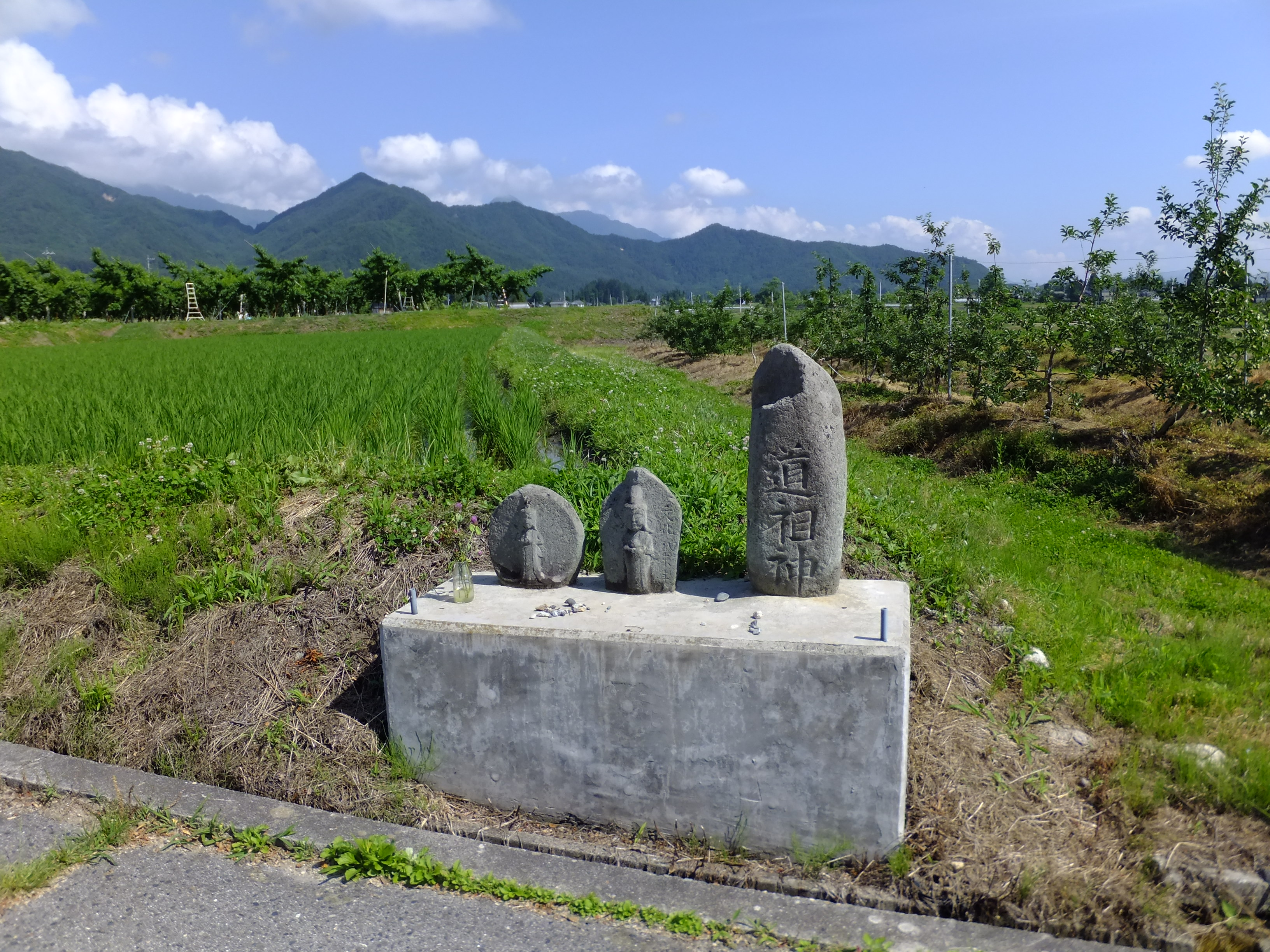 長野県北安曇郡松川村の道祖神